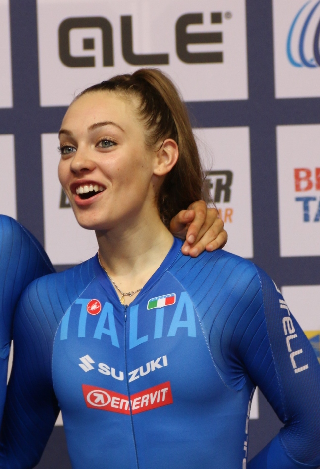 Letizia Paternoster, italienische Radsportlerin